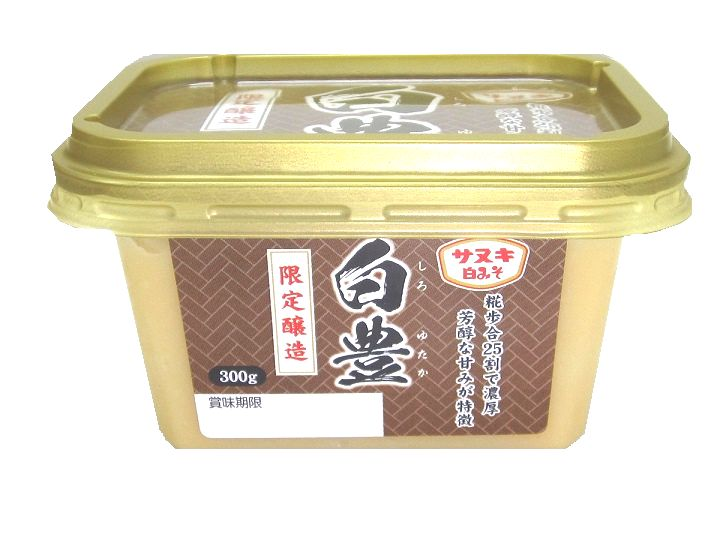 サヌキ白みそ白豊